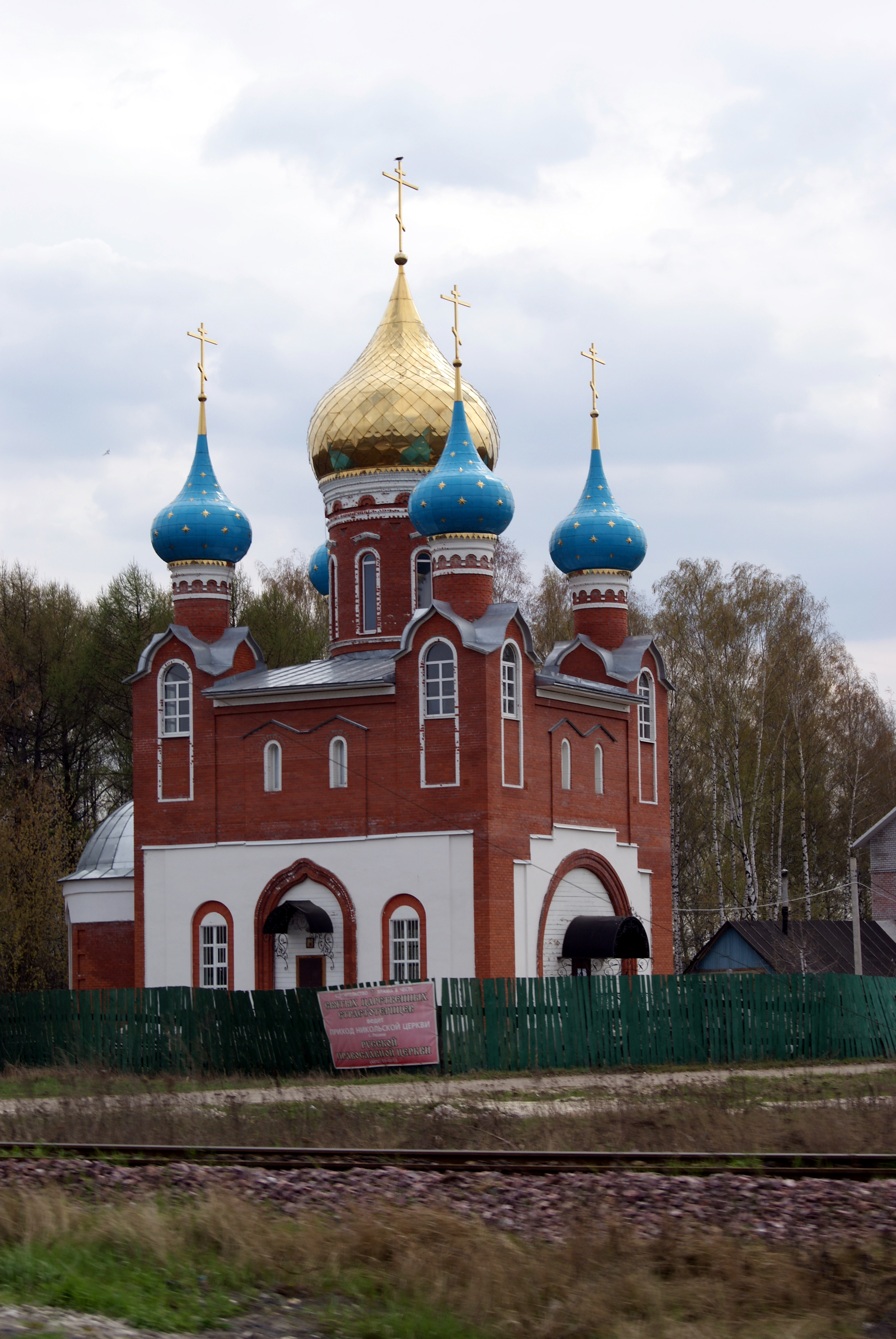 Храм Царственных Мучеников (Рязань) (Храм святых царственных страстотернцев)